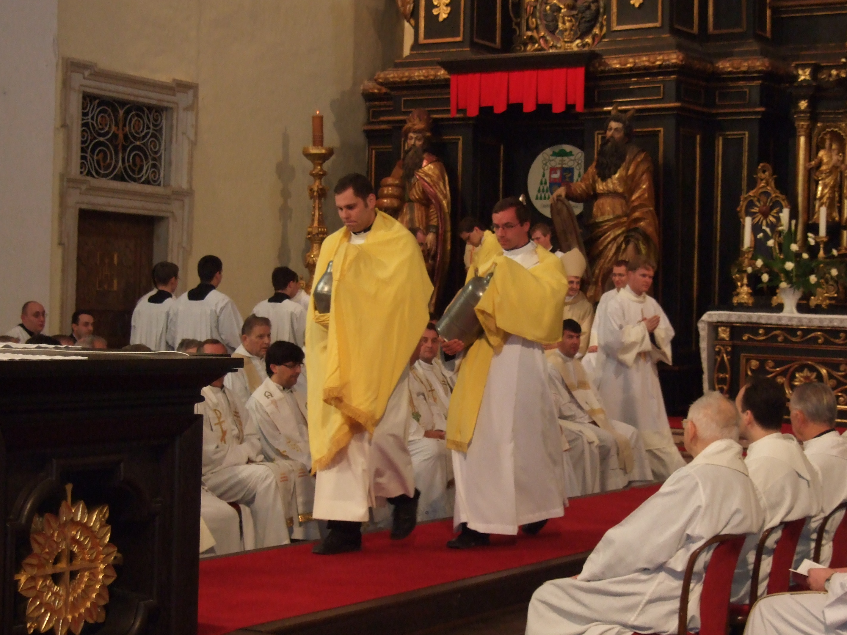 Svätenie olejov na zeleny stvrtok (Slovakia, Trnava, 2007)